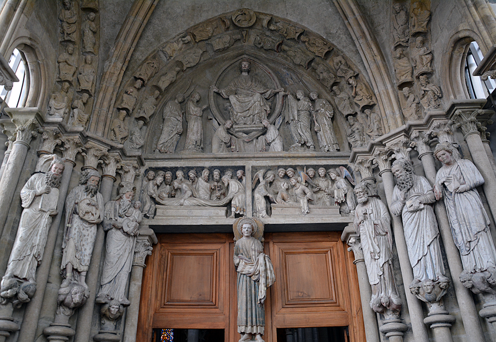 Portail peint, Cathédrale Notre-Dame, Lausanne